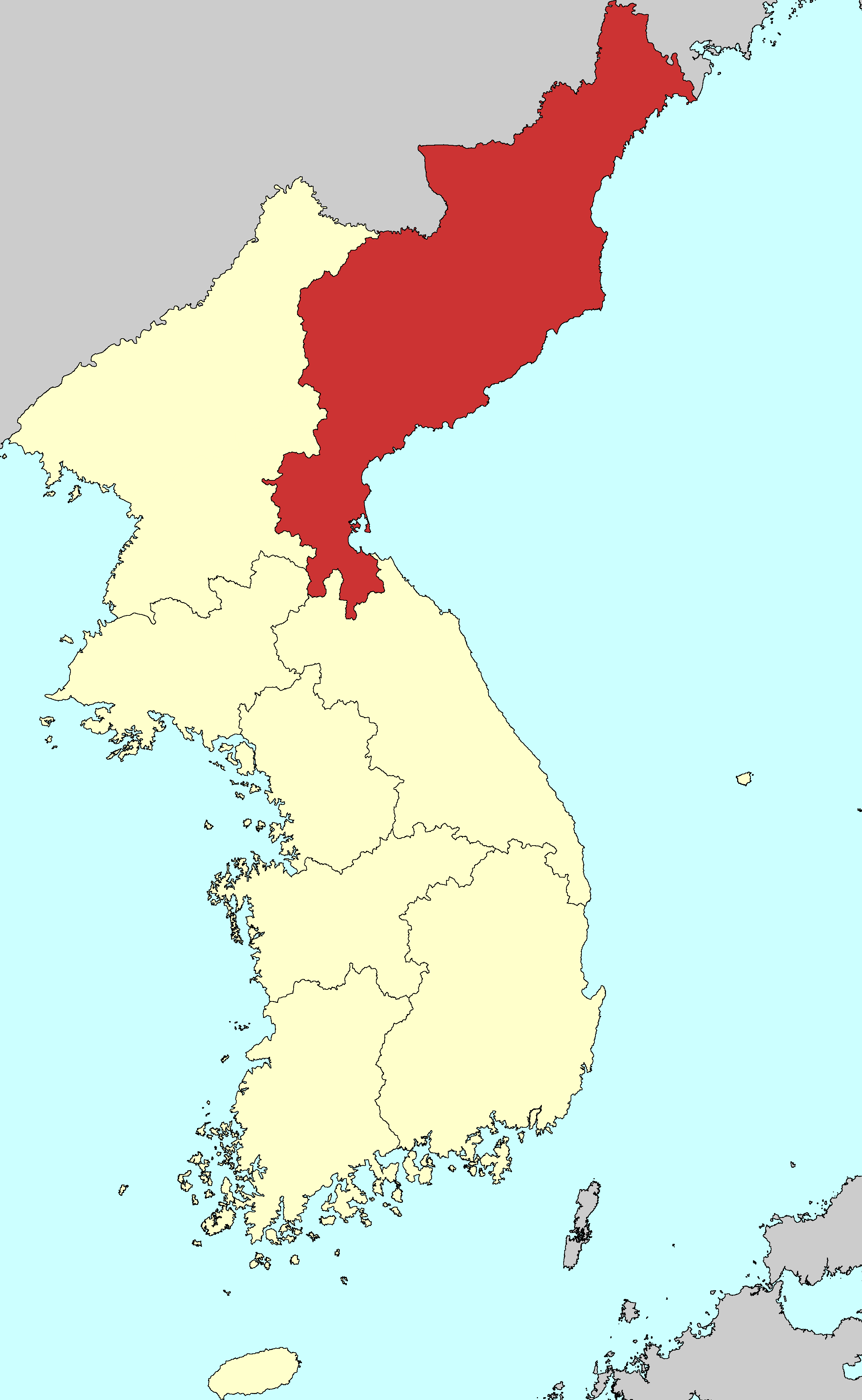 조선후기 함경도